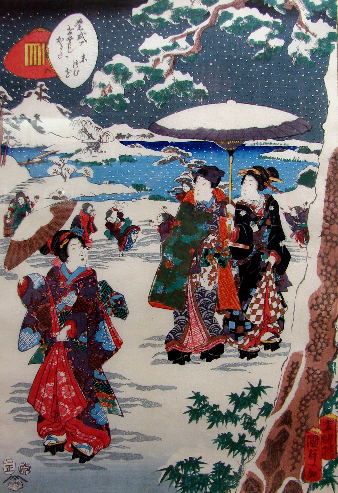 Illustration du Genji Monogatari, 19ème siècle. Musée Saint-Remi à Reims.